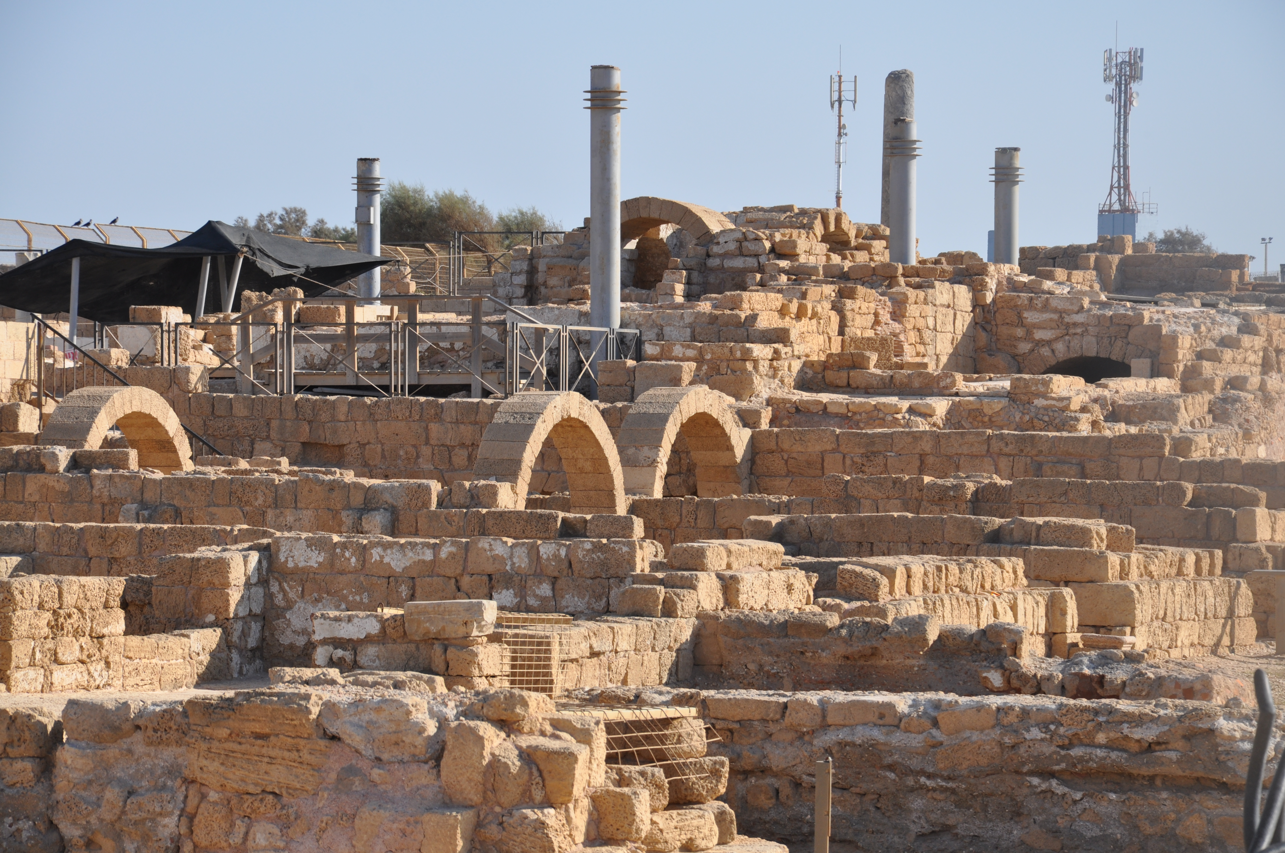 Opgraving